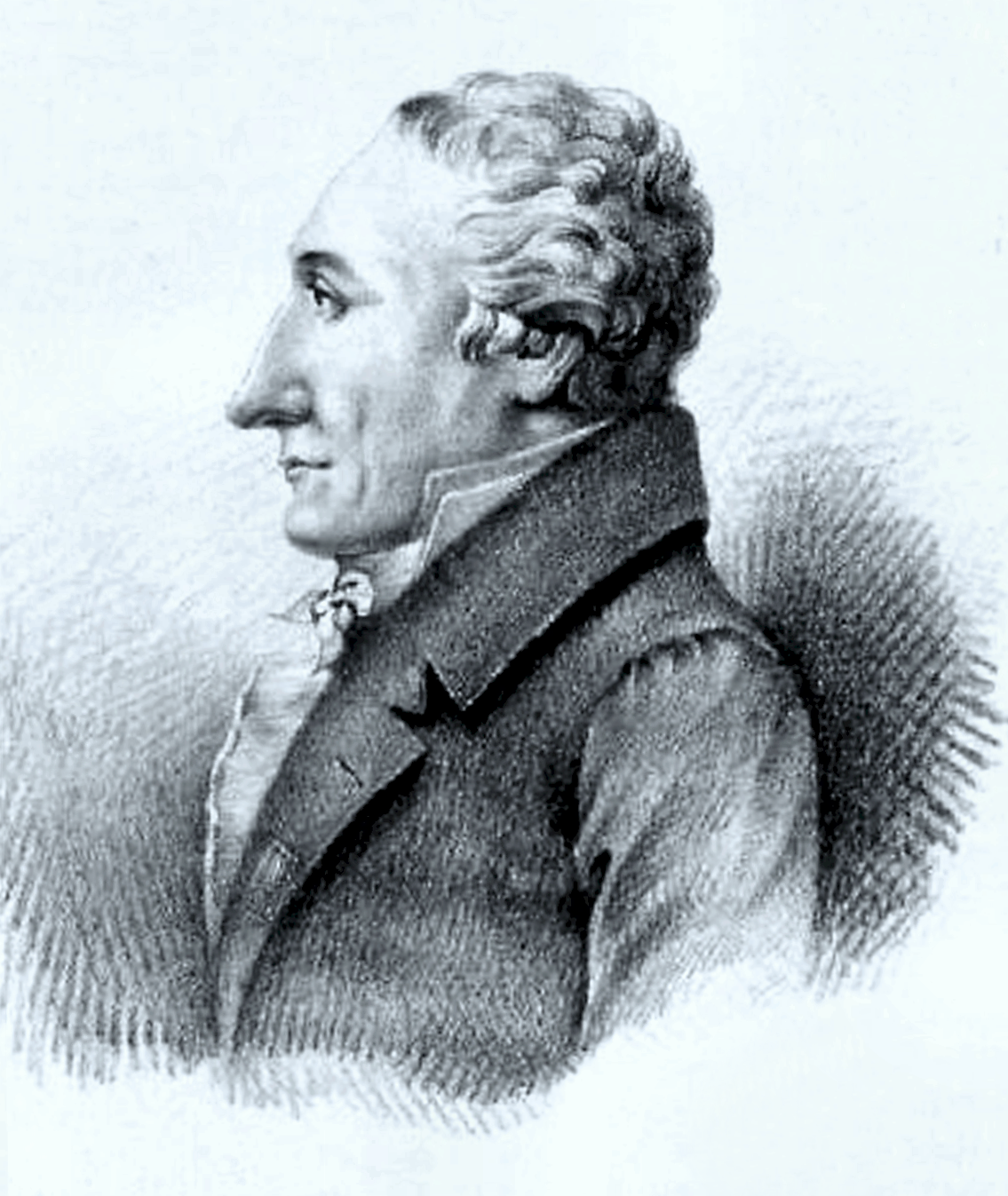 Jean Florimond Boudon de Saint-Amans (1748-1831)